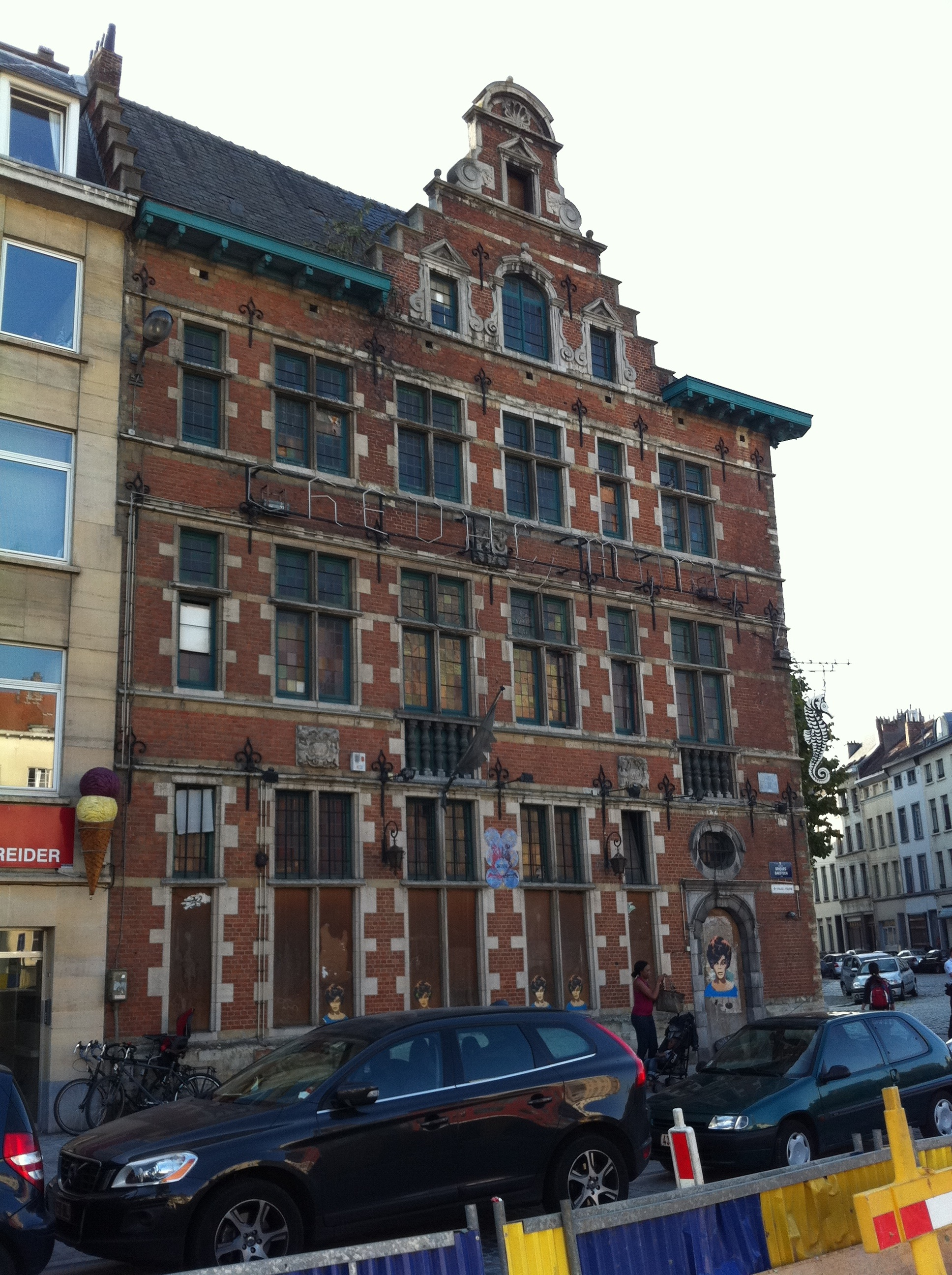 Le Cheval Marin - BAKSTEENKAAI 90